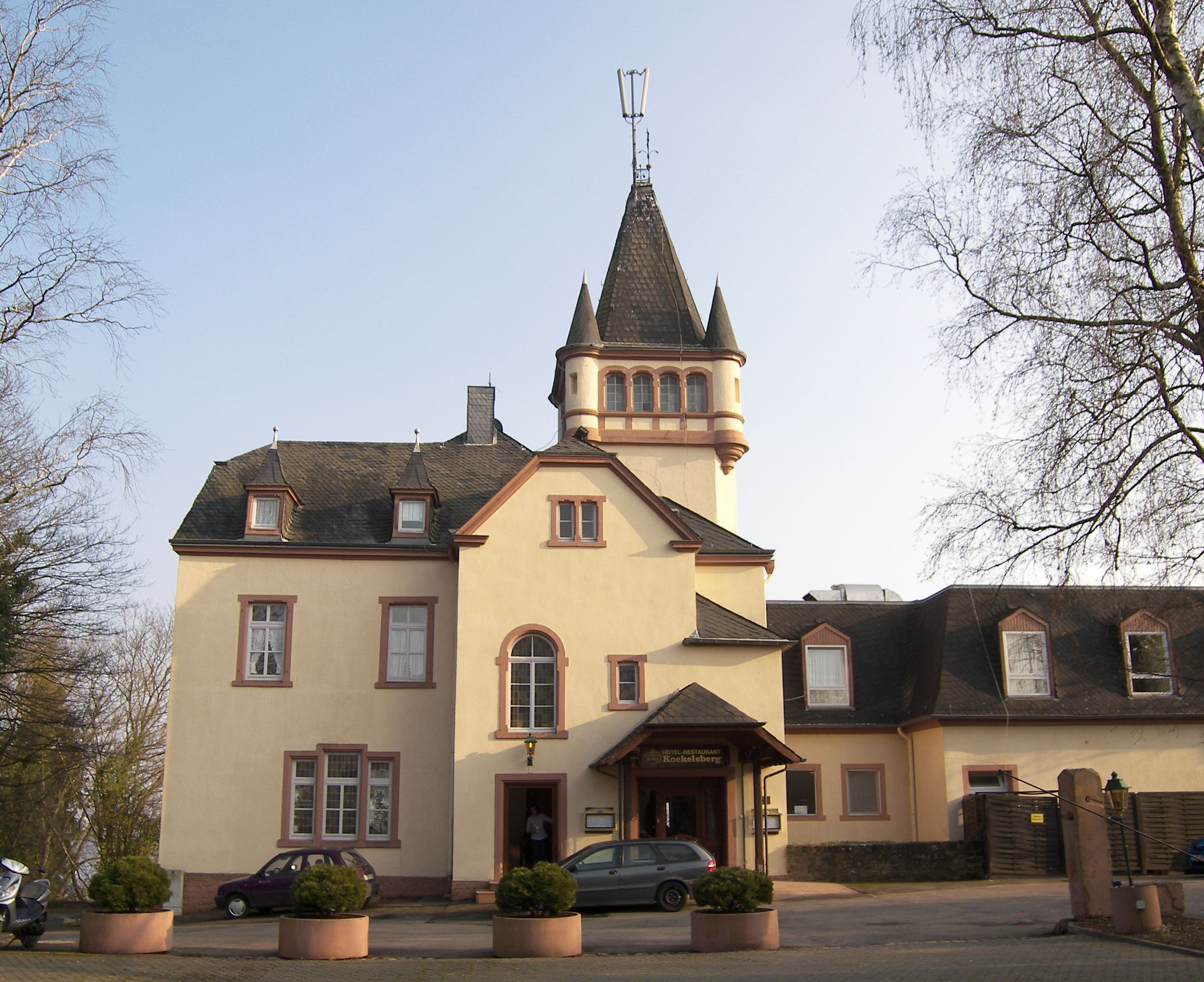 Villa Kockelsberg in Trier, Rheinland-Pfalz